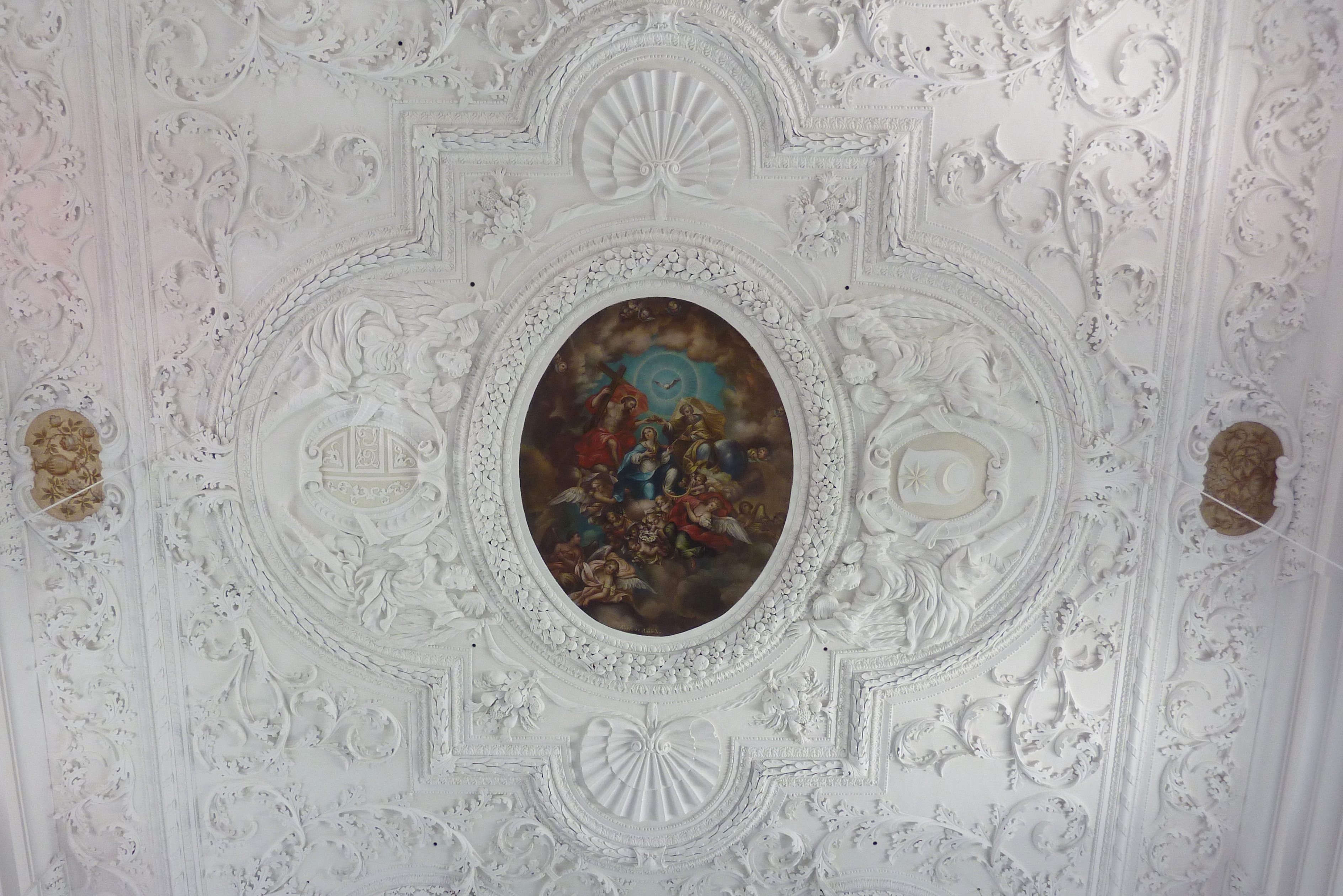 Katholische Wallfahrtskirche Unsere Liebe Frau in Münsterhausen im Landkreis Günzburg (Bayern), Stuckdekor des Langhauses von vor 1708, Deckenbilder (Öl auf Leinwand) von vor 1708; Darstellung: Marienkrönung (Mitte); Grisaillefresken (seitlich) von 1901/02